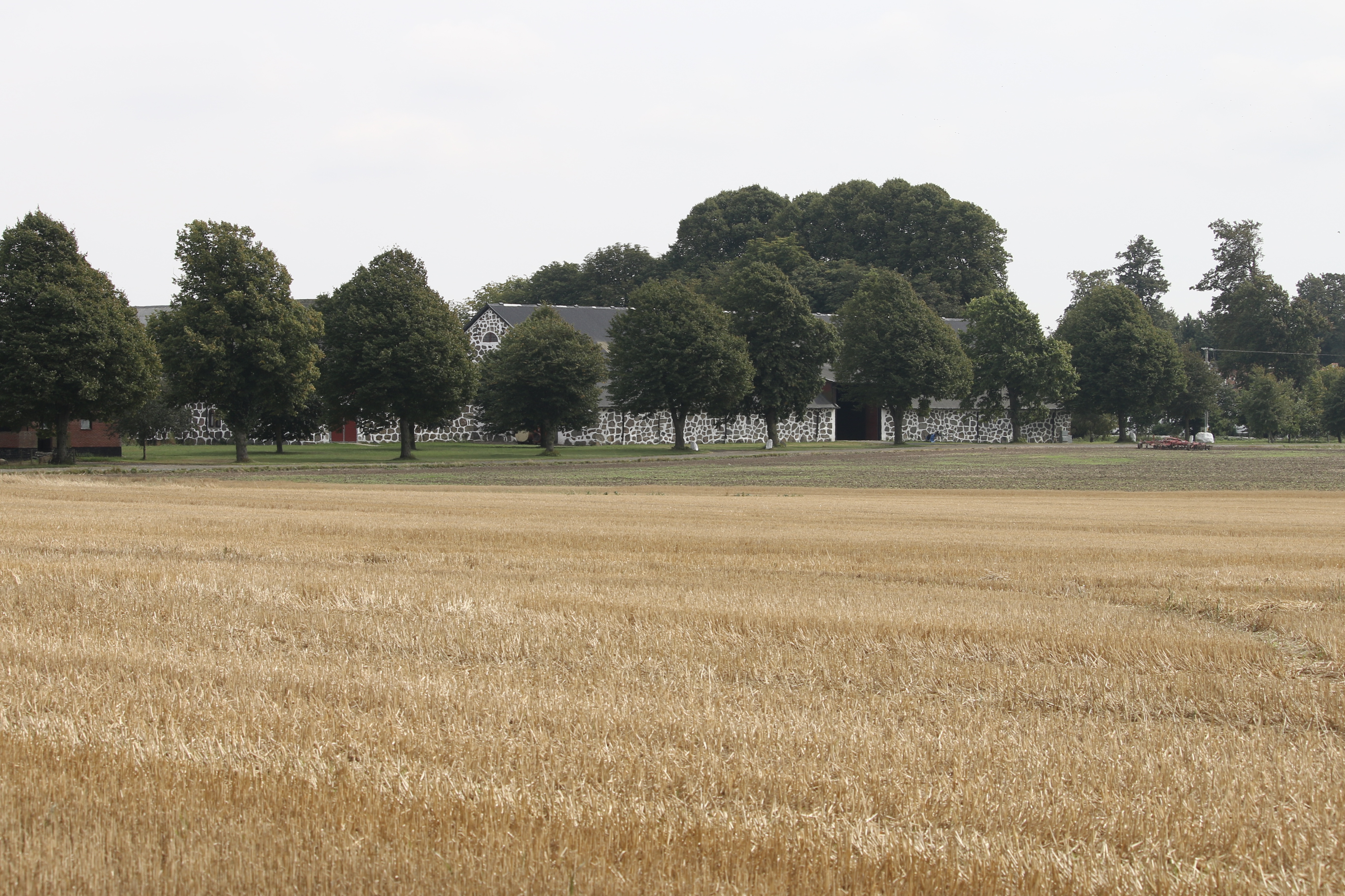 Henriksfält gård, Österlen